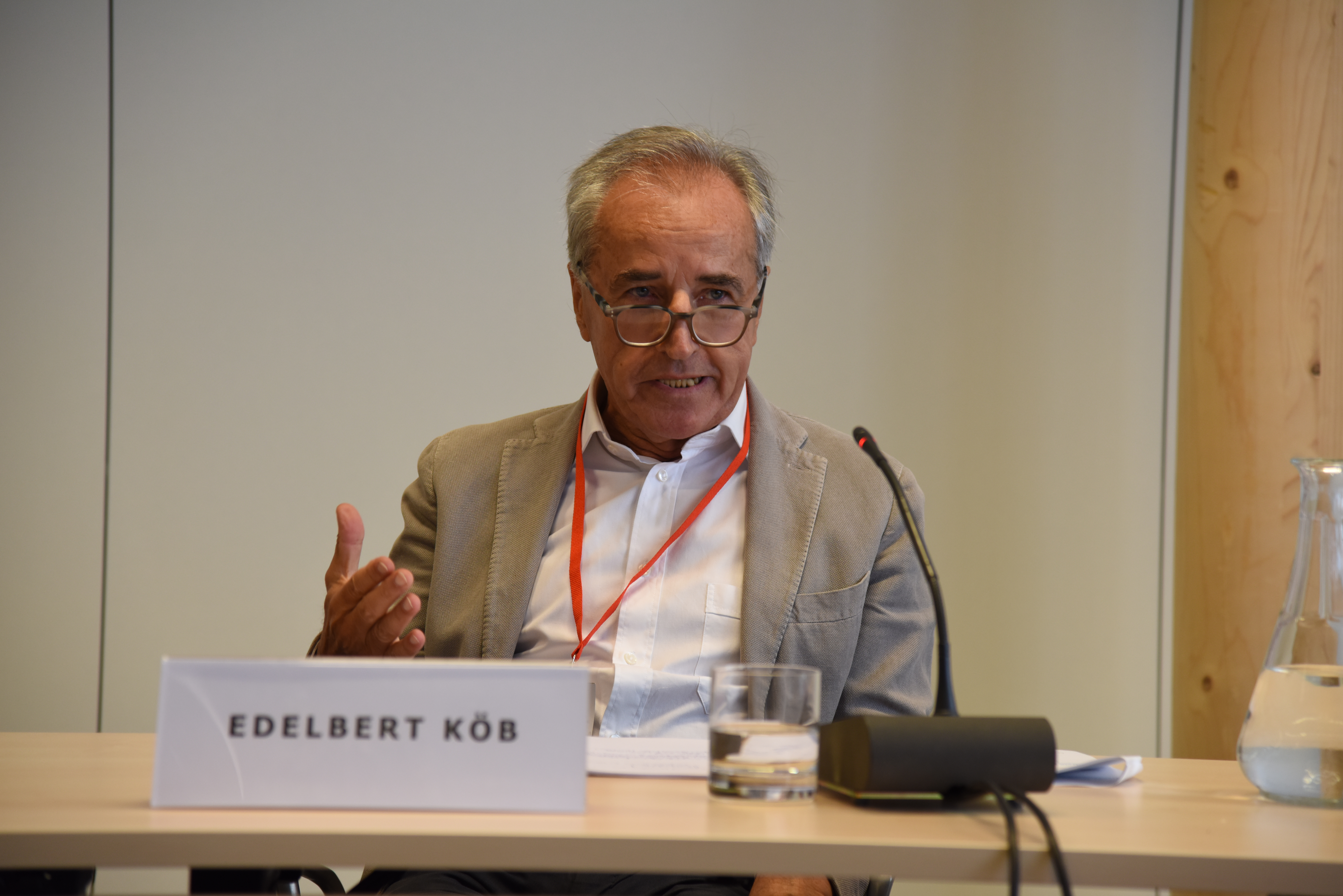 DSC_0730_Köb_03